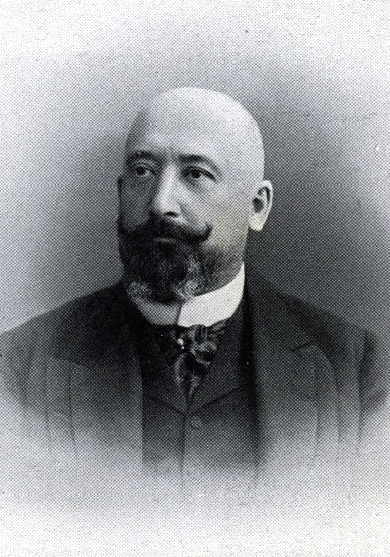 Каютов, Андрей Павлович